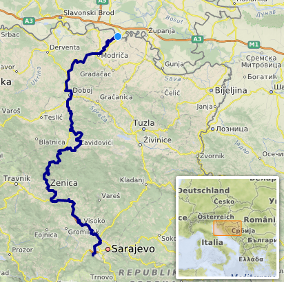 carte réalisée sur umap [1] This map may be incomplete, and may contain errors. Don't rely solely on it for navigation.